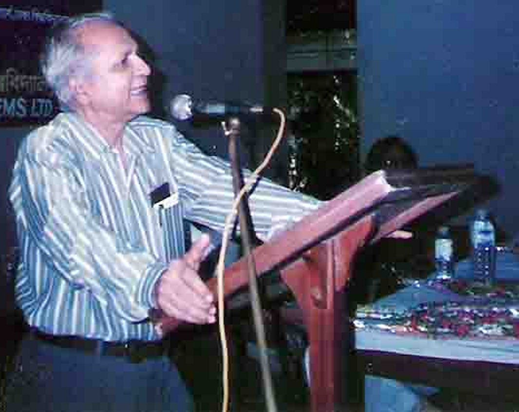 Abdullah-Al-Muti